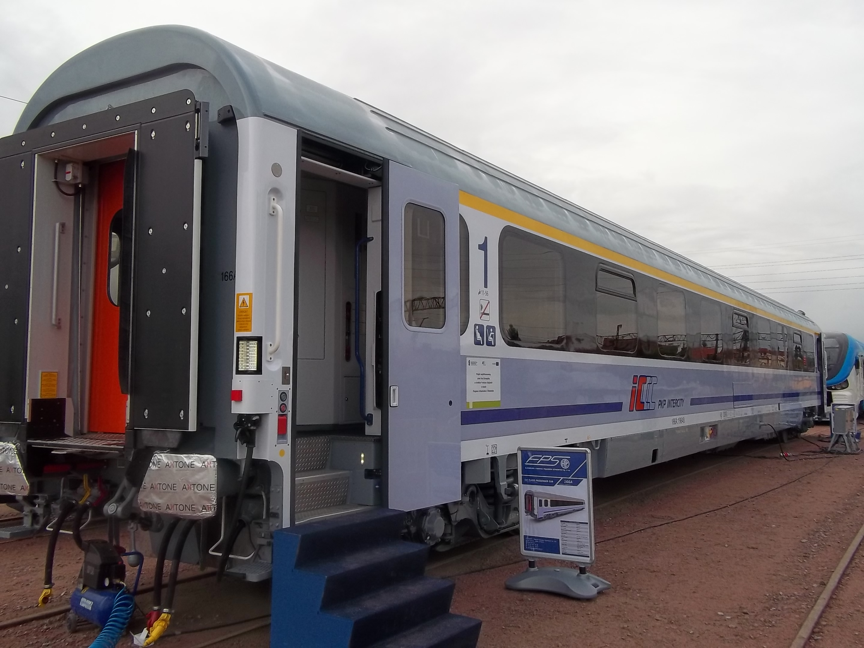 Widok zewnętrzny wagonu pasażerskiego przedziałowego klasy 1. typu 166A z klimatyzacją, wyposażonego w zamknięty układ WC, hamulce tarczowe i szynowe, dopuszczonego do prędkości maksymalnej 200 km/h, wyprodukowanego przez H. Cegielski - Fabryka Pojazdów Szynowych Sp. z o.o. w Poznaniu.